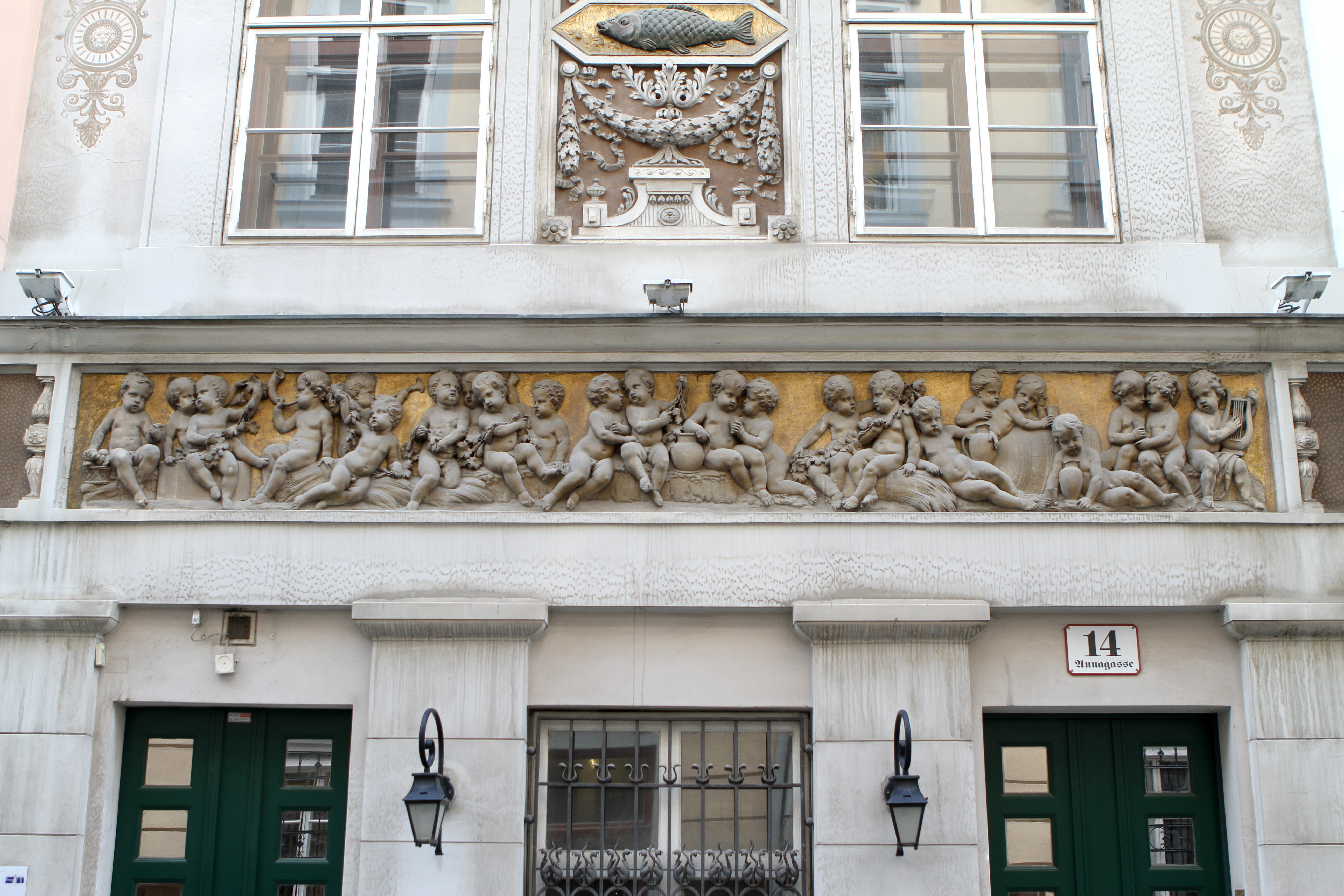 Zum Blauen Karpfen/ehemals Zum Dampfschiff